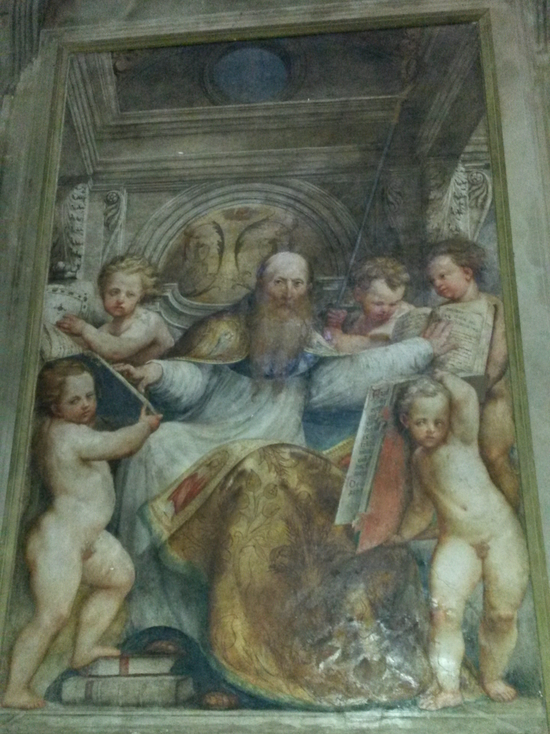 Basilica di Santa Maria di Campagna, Piacenza